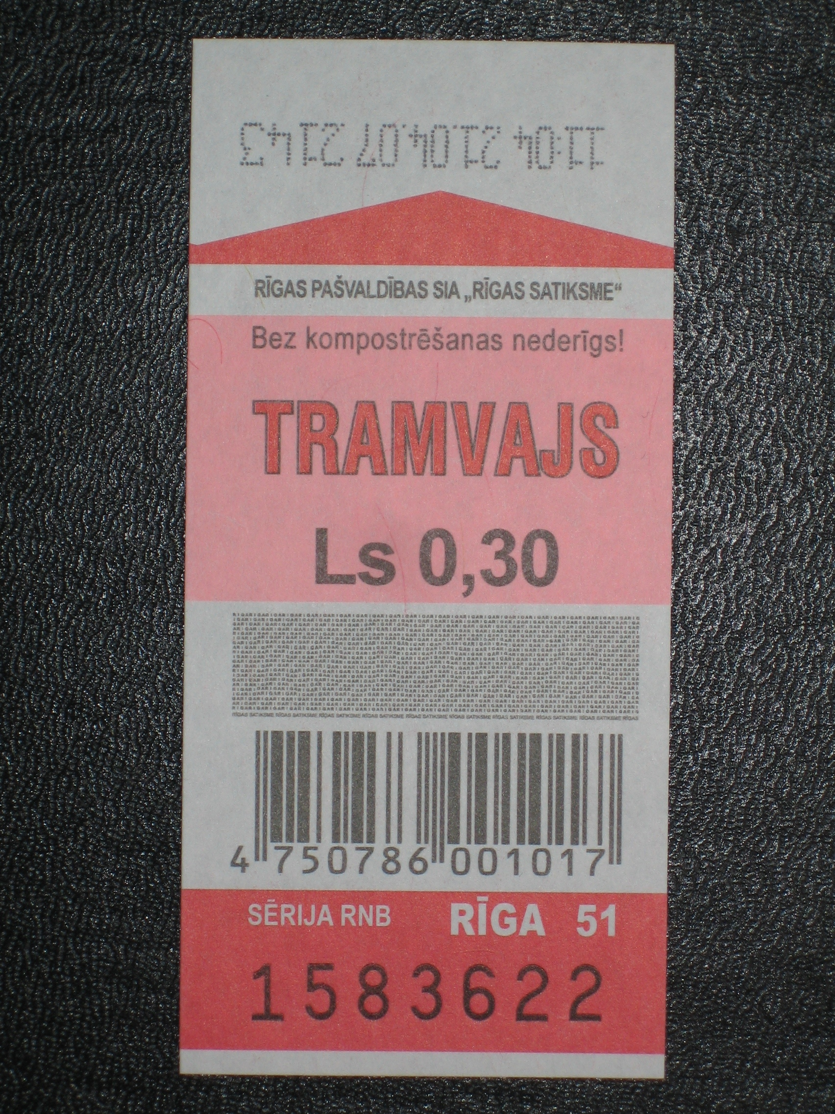 Tramvaja biļete Rīgā 2007. gadā.